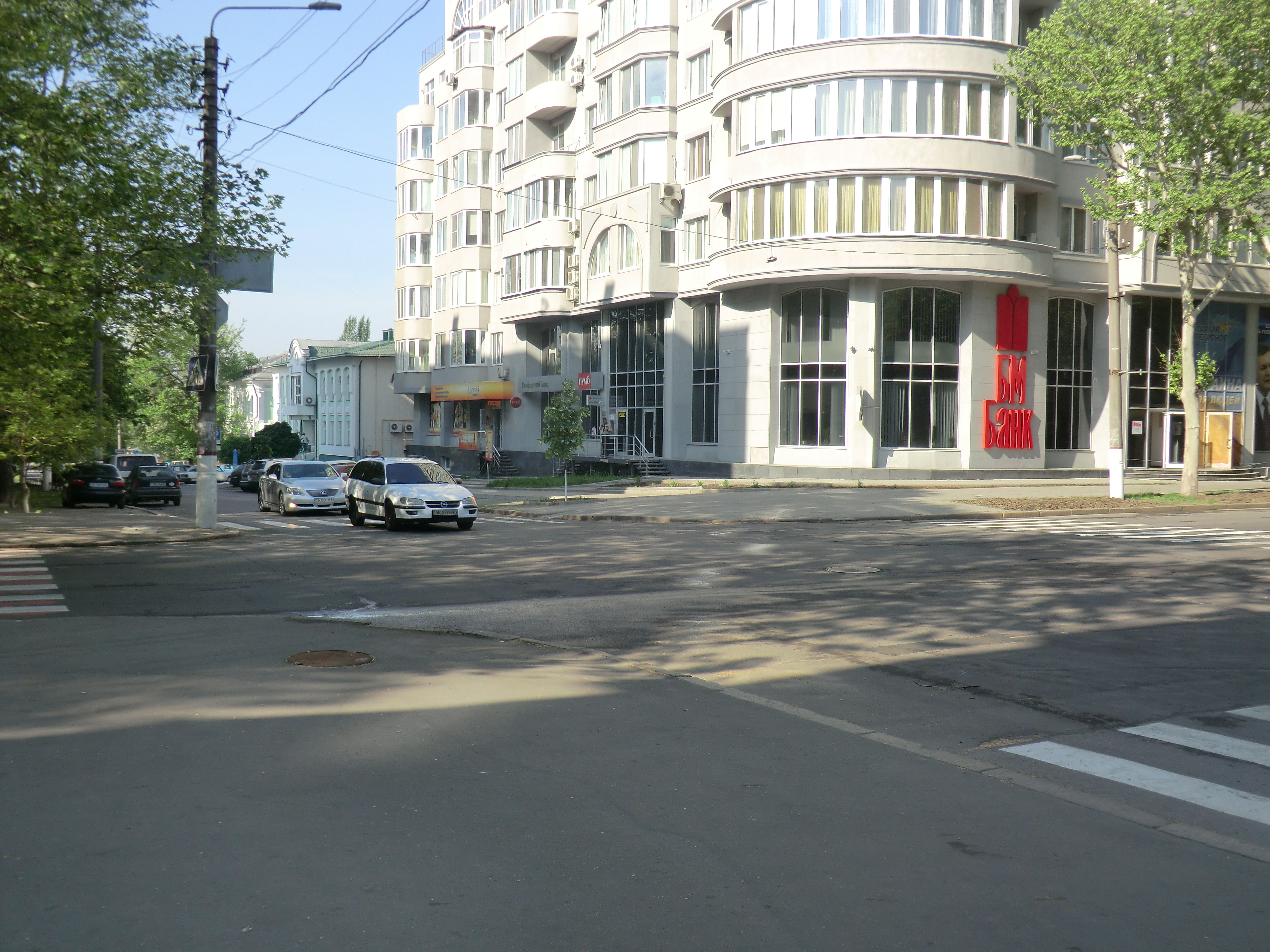 Перекрёсток улиц Карла Либкнехта и Адмиральской (Николаев)